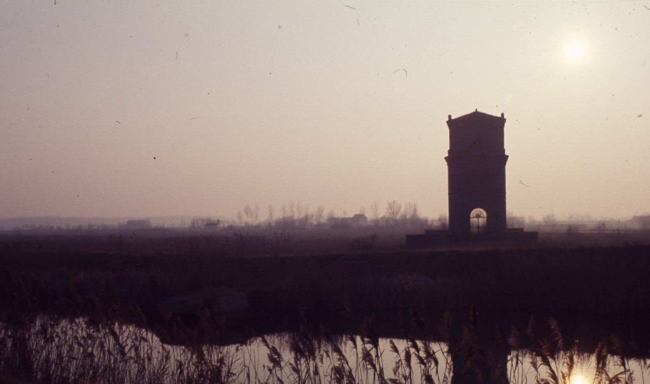 negative circa relative alla campagna fotografica eseguita nel periodo dicembre '74-febbraio '75 [...] - Mesola, Valli di Comacchio, Verginese, Belriguardo, Copparo, Pomposa, Chiaviche, Bonifiche, La Stellata, Cento etc. - Fonte: Monografia: Territorio ferrarese: un programma di governo della Regione e delle autonomie locali, catalogo della mostra, Ferrara 1975, a cura di Roberto Fregna, Modena, Soc. Immobiliare & Poligrafica emiliana (1975). - Fonte: Fattura di Paolo Monti: IV. Commesse/ Fattura n. 16/ Diapositive per audiovisivo Regione Emilia-Romagna (1973/10/22), presso Archivio Paolo Monti. N. 1000 diapositive a colori formato 35mm sugli aspetti del patrimonio naturale, artistico e culturale della Regione. Dal territorio di Parma e Piacenza, fino a Ravenna e oltre, compreso il ferrarese e il Delta del Po, gli Appennini [...]